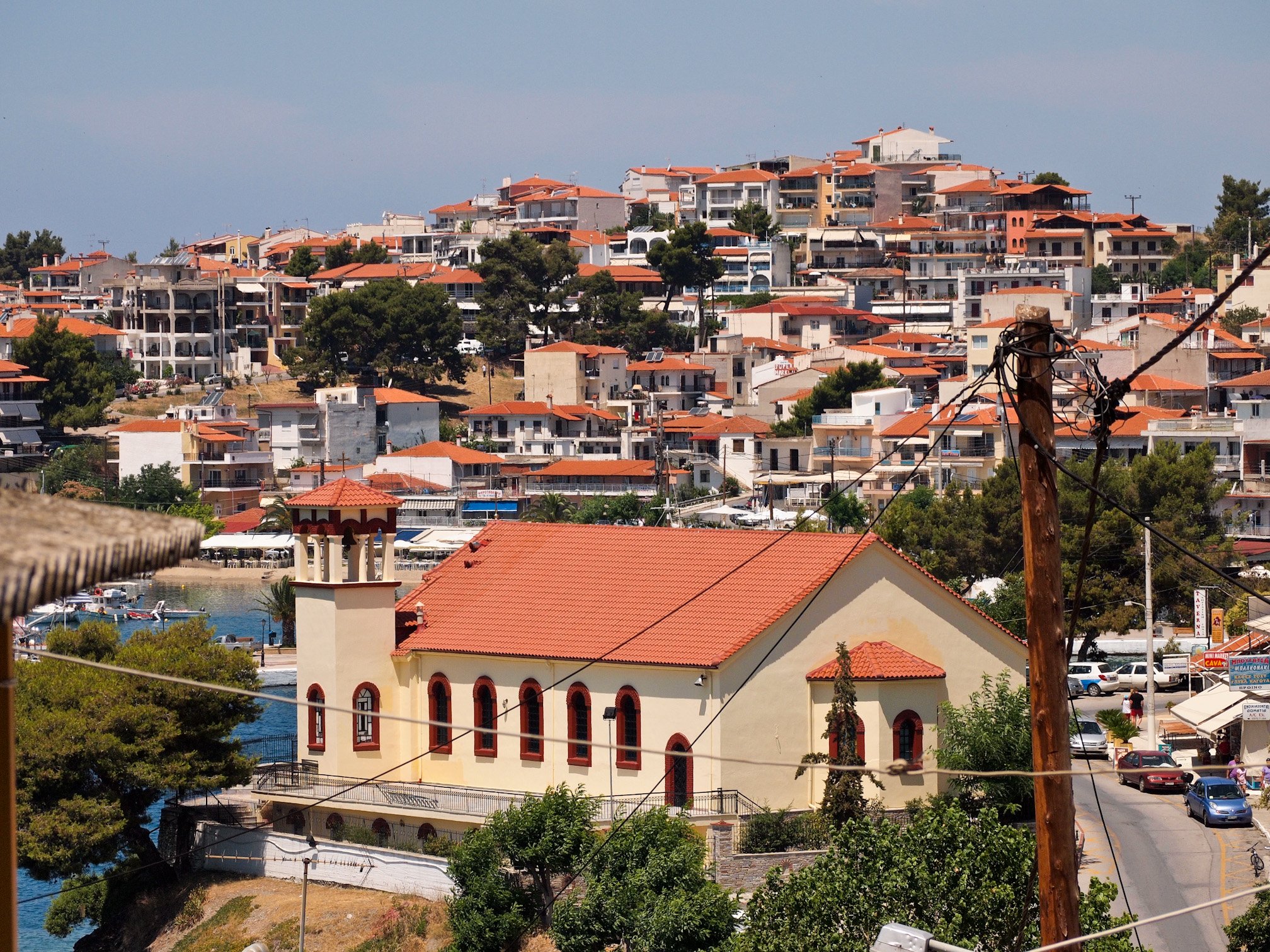 Εκκλησία των Αγίων Ταξιαρχών (1937)